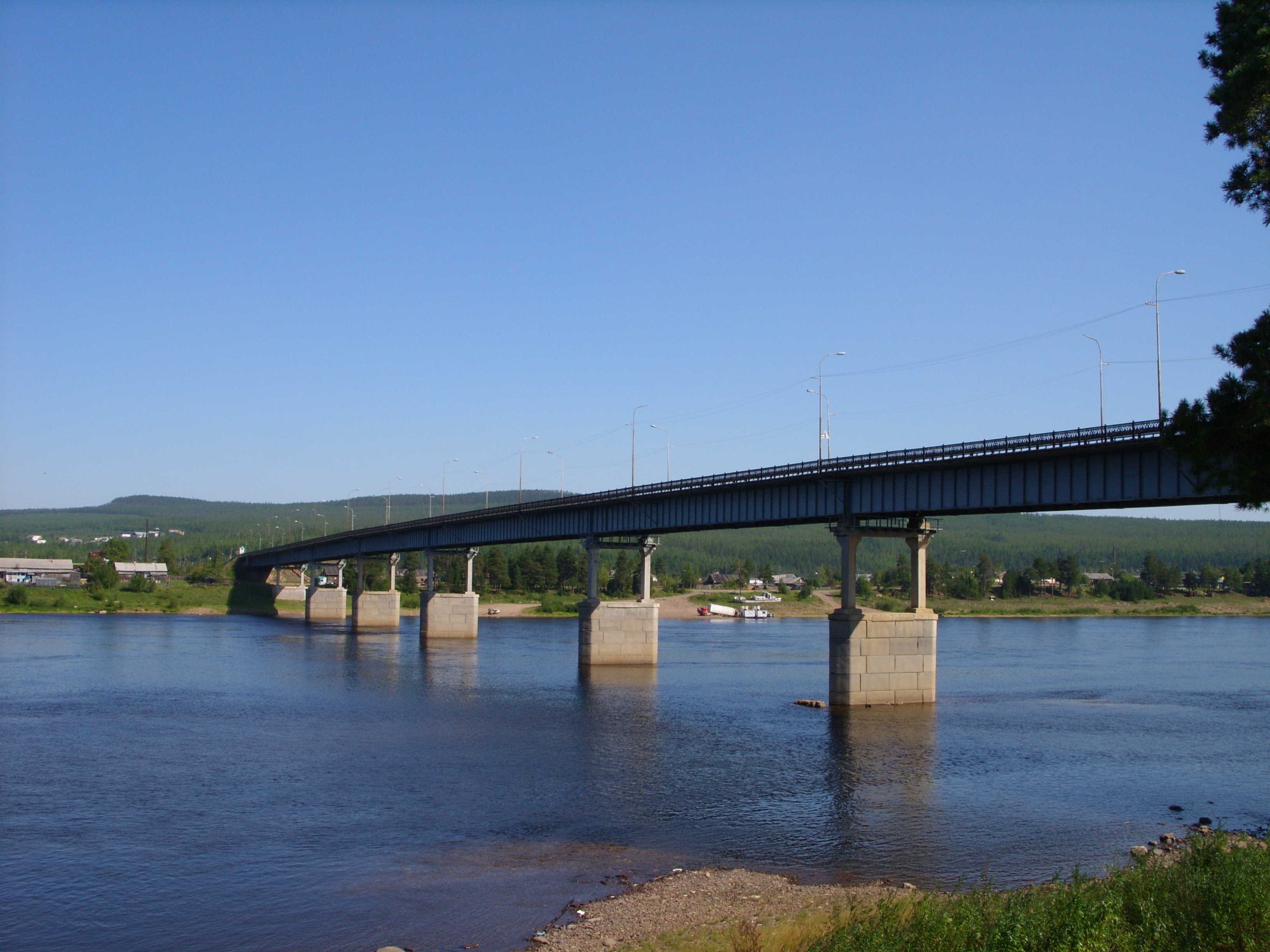 Автомобильный мост через реку Алдан в Томмоте, Якутия. Снимок 2011 г.